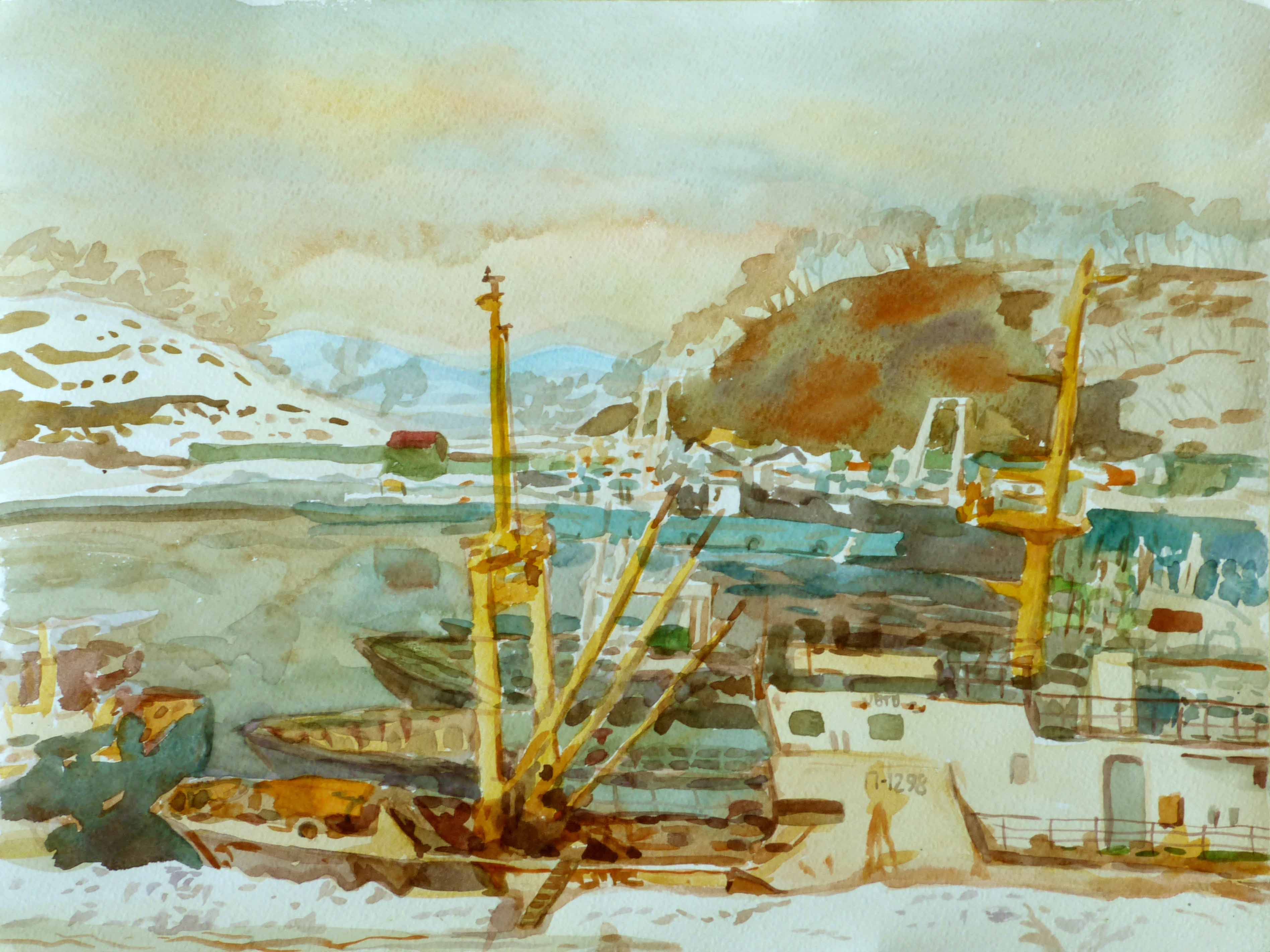 Работа сделана во время приезда на краевой конкурс детского творчества в Петропавловске-Камчатском в 2012 годы в апреле.